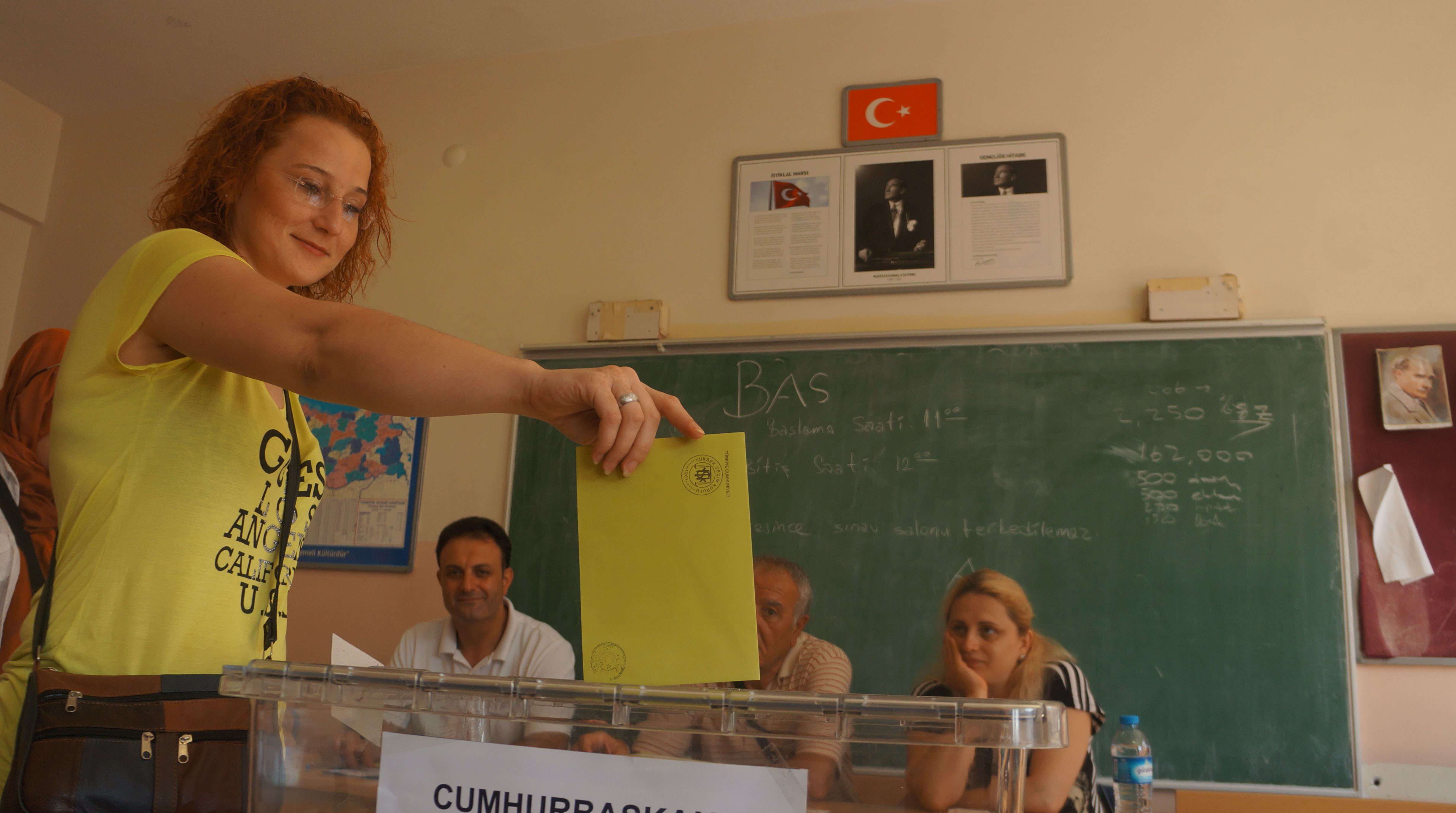 İstanbul'da bir okulda 2014 Türkiye cumhurbaşkanlığı seçimi için oy veren vatandaş.